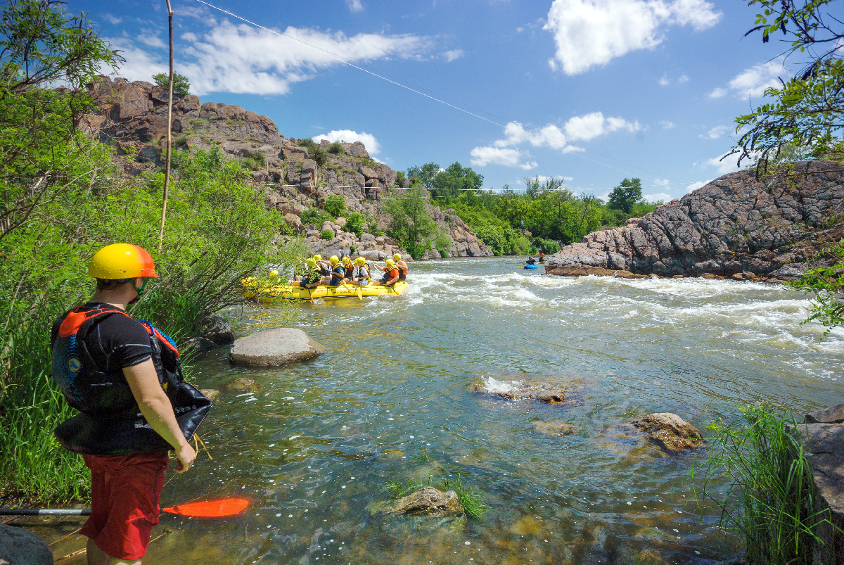 Протичанська скеля, Первомайський р-н, с. Мигія